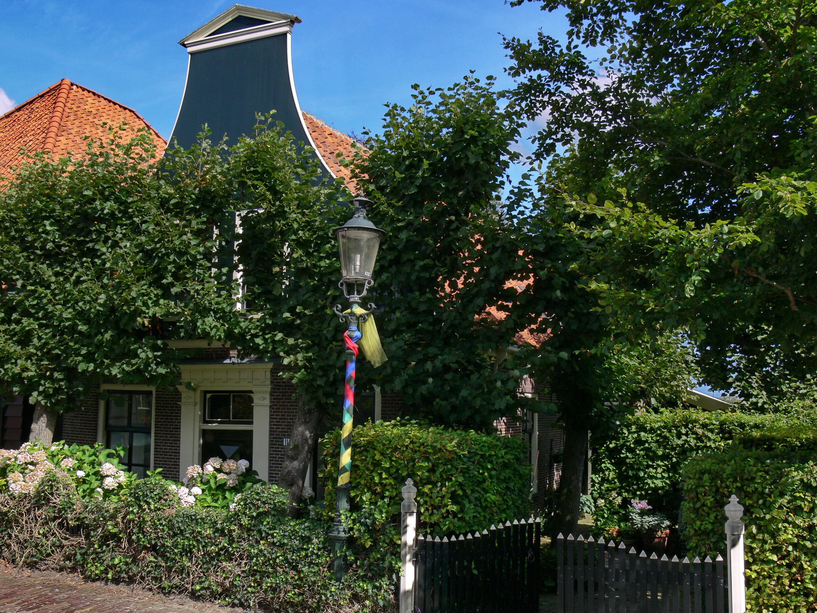 Pand zonder verdieping, onder pannen zadeldak met houten klokgevel aan de voorzijde en voorschot met makelaar aan de achterzijde, eind 18e eeuw. Frontonbekroning op de klokgevel. Deuromlijsting met gecanneleerde pilasters en hoofdgestel met in het fries triglyphen en metopen. Deur met panelen. Houten afhang aan een zijde van het huis.